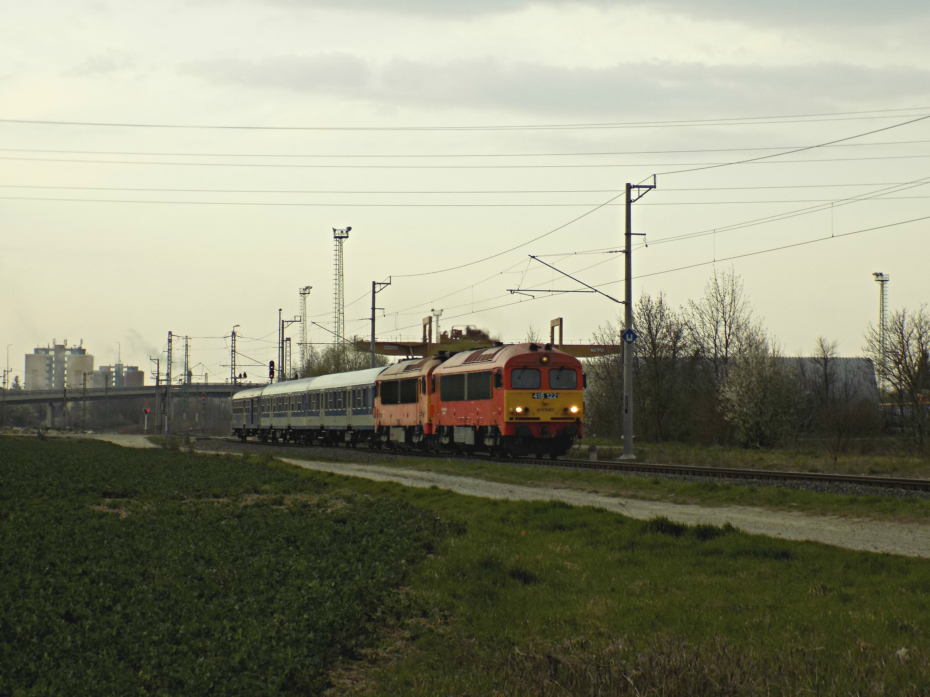 418-122 a 418-319-et előfogatolva hagyja el Szombathelyet Pécs felé